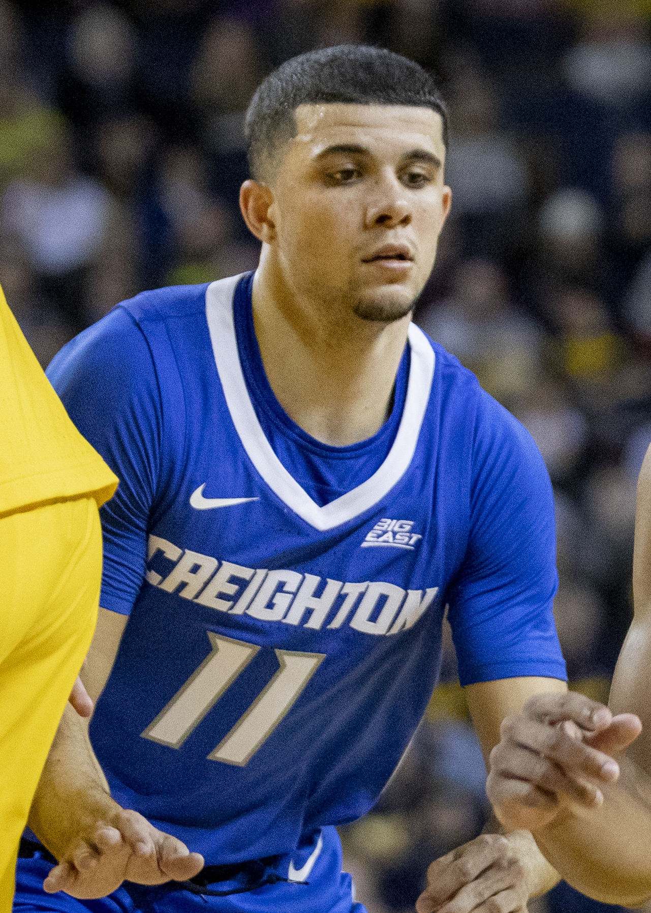 _O6A7388